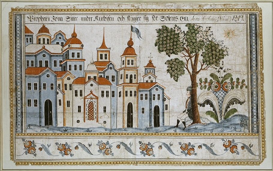 Jona utenfor Ninive under kurbitsen (ricine-busken) Herren lot vokse opp for å beskytte ham mot solen